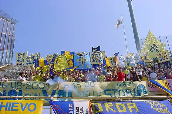 Tifosi dell'A.C. ChievoVerona allo stadio "Artemio Franchi" di Firenze per l'esordio in Serie A.